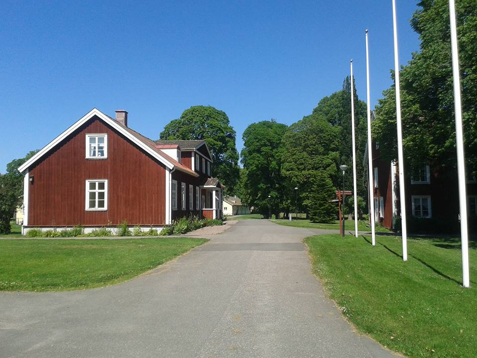 Skolan började sin verksamhet 1873 i Ullervad nära Mariestad, flyttade efter fem år till Stenstorp och år 1923 till Axvall. Tidigare hette skolan Skaraborgs läns folkhögskola och hade Skaraborgs läns landsting som huvudman ända till 1982. Den nuvarande huvudmannen är Stiftelsen för Axevalla folkhögskola, vars stiftare är Sverigefinska Riksförbundet och därför har finska språket ett stort utrymme på skola, vilket bland annat syns i skolområdet som är skyltat på svenska och finska.